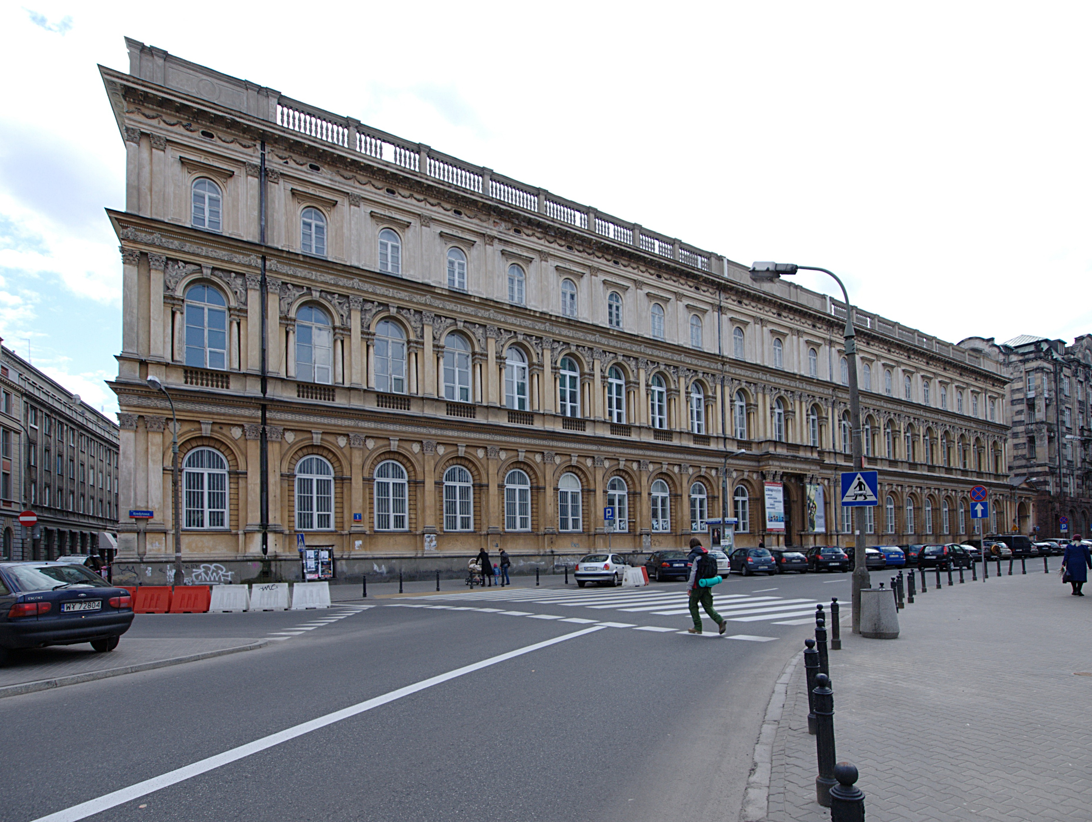 Państwowe Muzeum Etnograficzne. Ulica Kredytowa 1